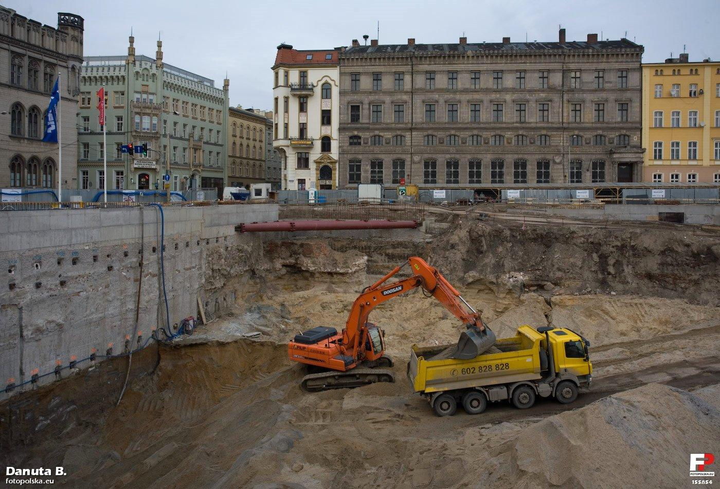 W północno-zachodnim narożniku widać kolejny fragment odsłoniętego muru miejskiego. Tu pracują jeszcze archeolodzy.